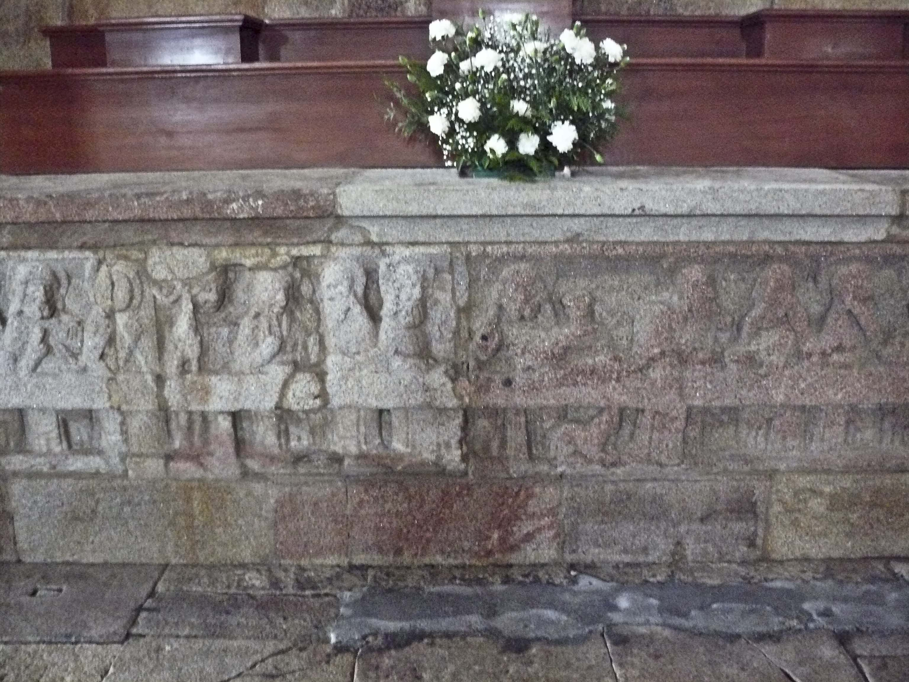 Última Cea-Peza dun posíbel altar románico. Mosteiro de Aciveiro